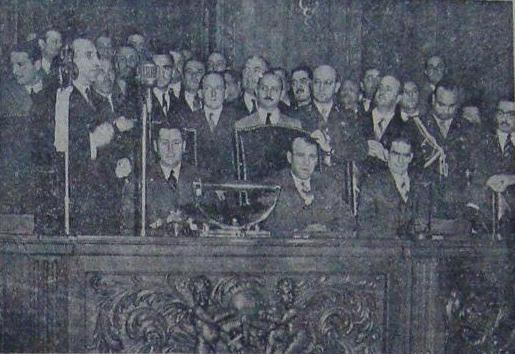 El Ministro del Interior, Ángel Borlenghi (de pie) da un discurso durante el acto de asunción del Ministro de Trabajo y Previsión José Freire, en presencia del Presidente Juan Domingo Perón.